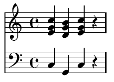 Authentische Kadenz (Notation) für den Artikel Kadenz (Harmonielehre)